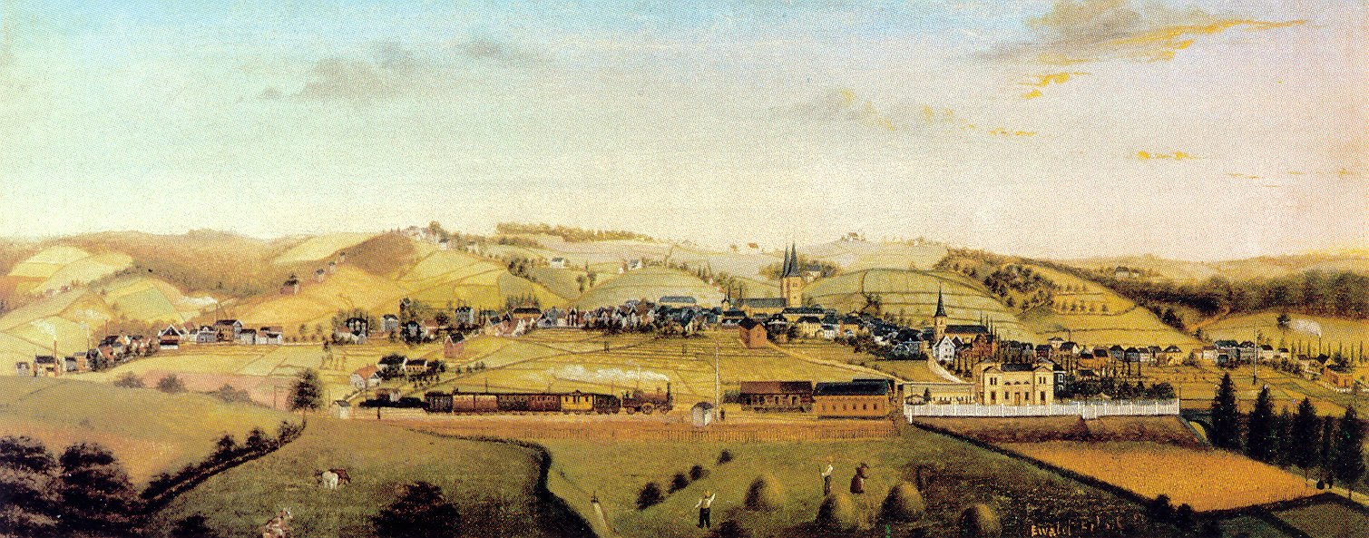 Ansicht der Stadt Schwelm mit der Bergisch-Märkischen Eisenbahn (Ölgemälde)